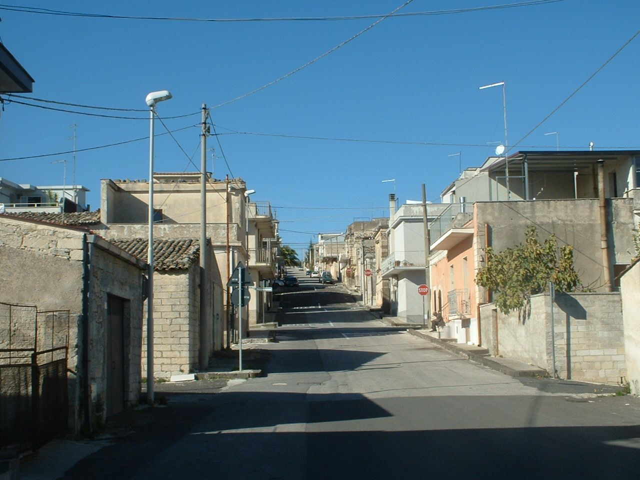 Cassaro (SR), View from Via Anapo